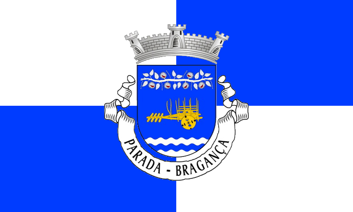 Bandera de la freguesia.